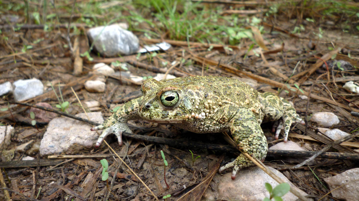 Sapo corredor (bufo calamita) en El Portús, Cartagena (Spain).